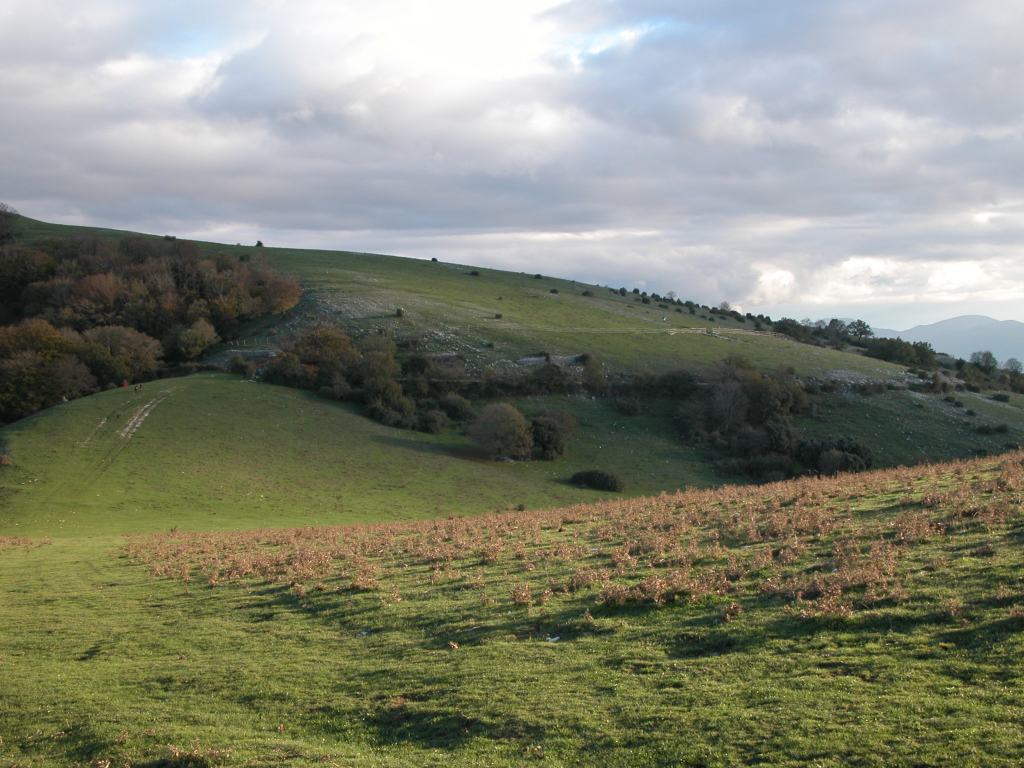 Monte Torre Maggiore panorama invernale